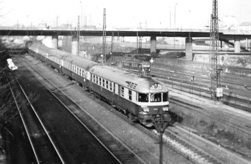 Mezinárodní expres Vindobona vedený motorovým vozem M 296.1 na hlavním nádraží v Drážďanech.